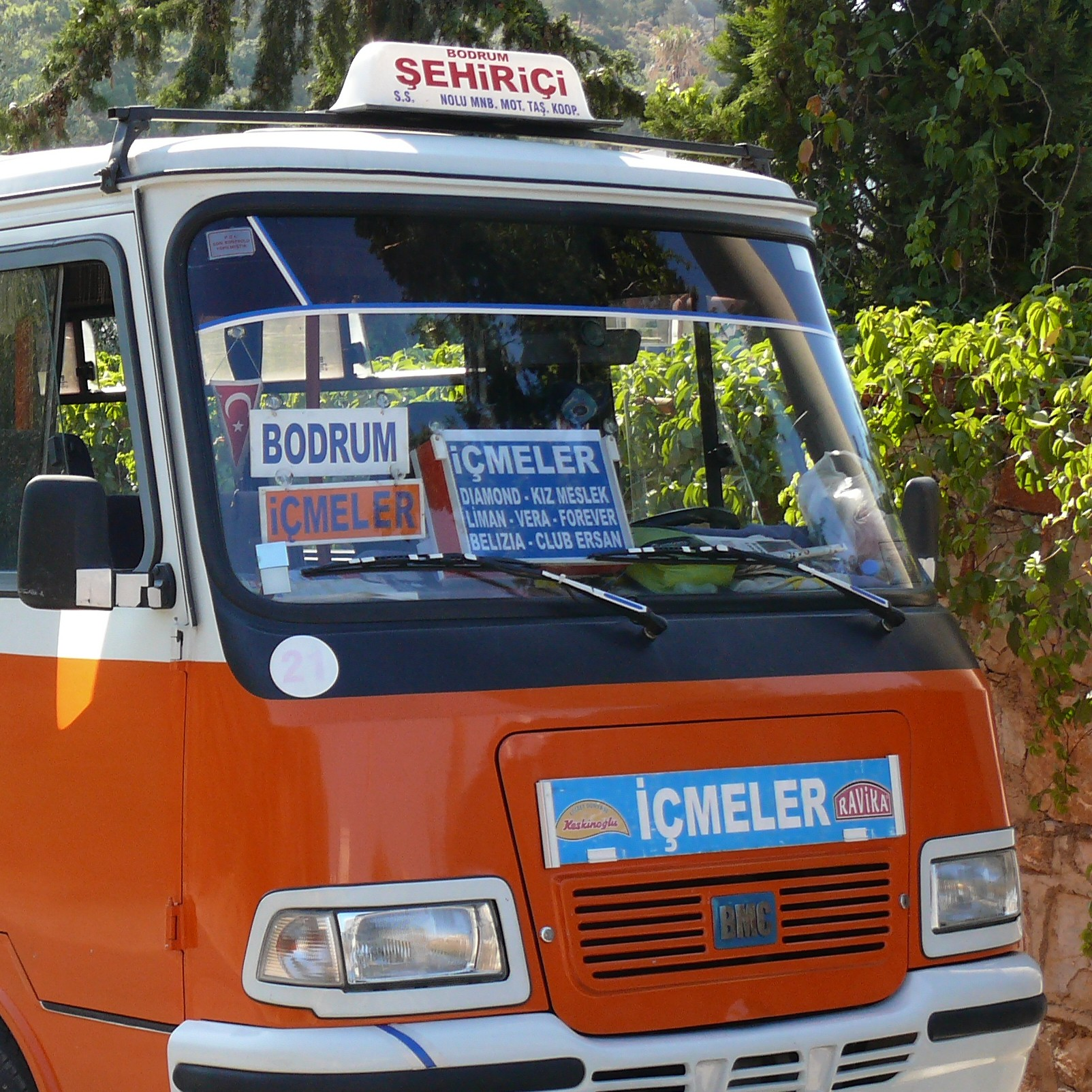 Face avant d'un dolmuş à Bodrum.